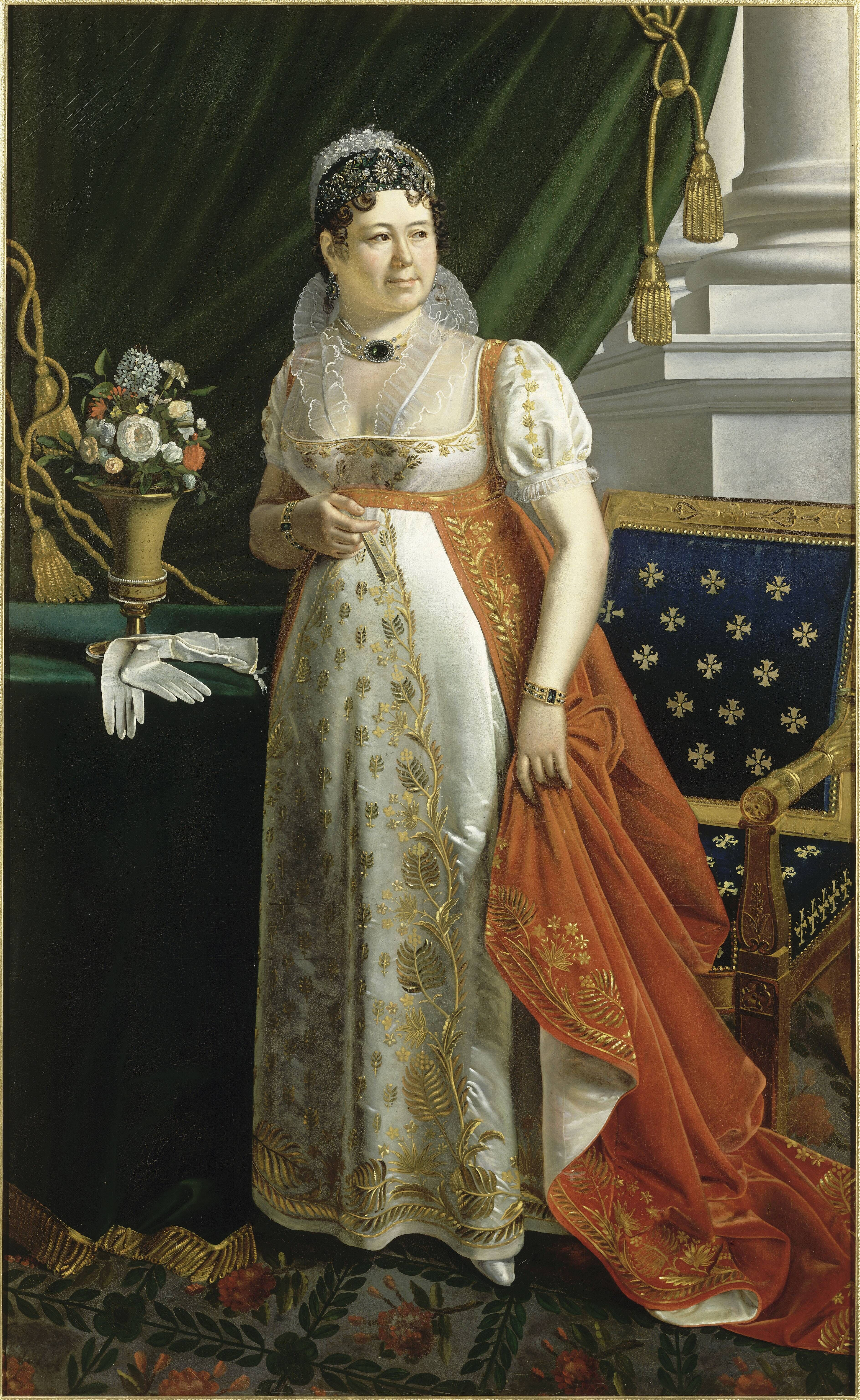 Portrait de Catherine Hubscher, Maréchale Lefèbvre Duchesse de Dantzig, dite "Madame Sans-Gène" (1753-1835)